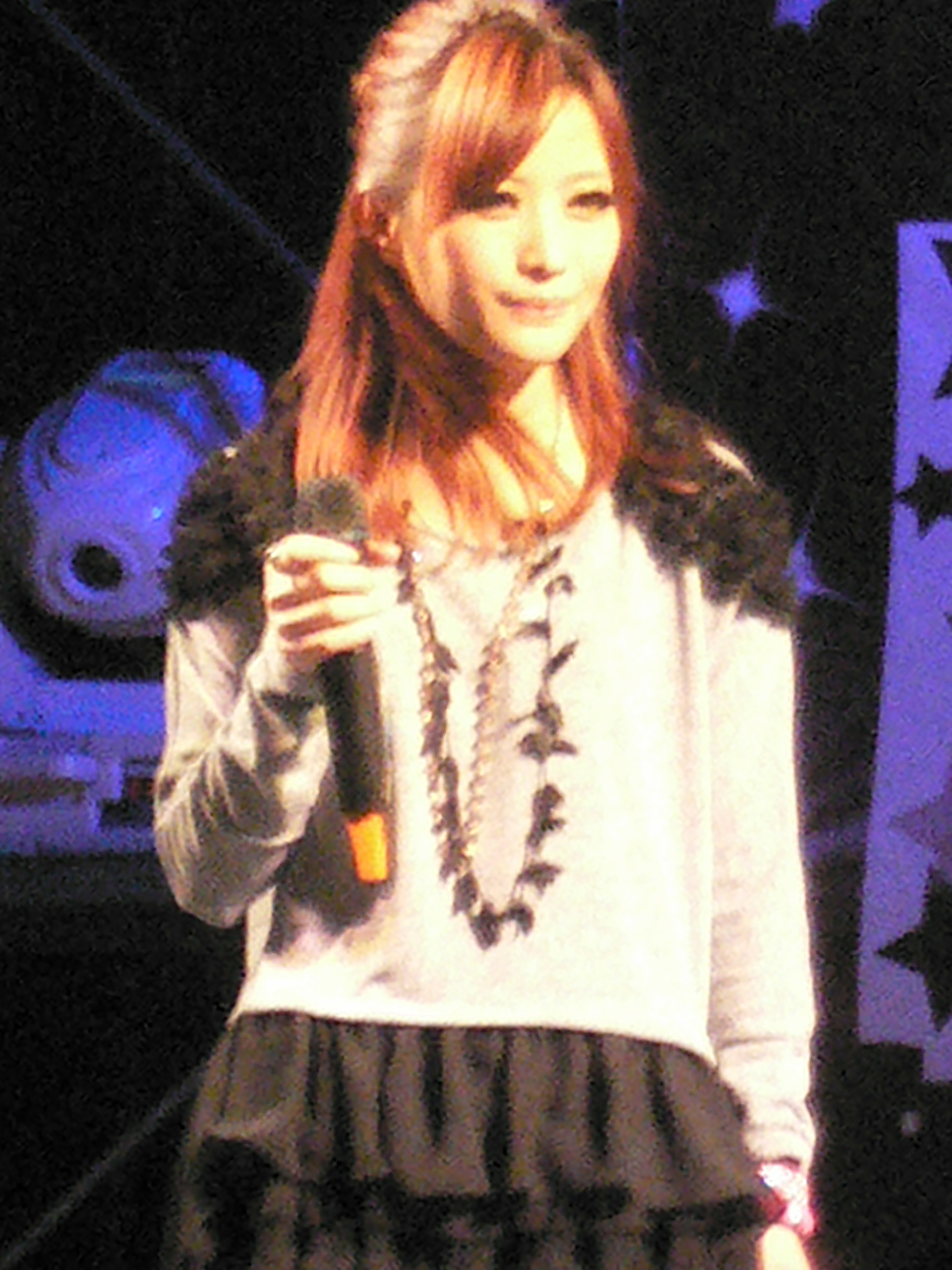 黃美珍在南台科技大學的《Nice Team Night》校園演唱會Bân-lâm-gú: N̂g Bí-tin(黃美珍) tsāi Lâm-tâi Kho-ki Tāi-ha̍k ê Nice Team Night hāu-hn̂g ián-tshiùnn-huē.